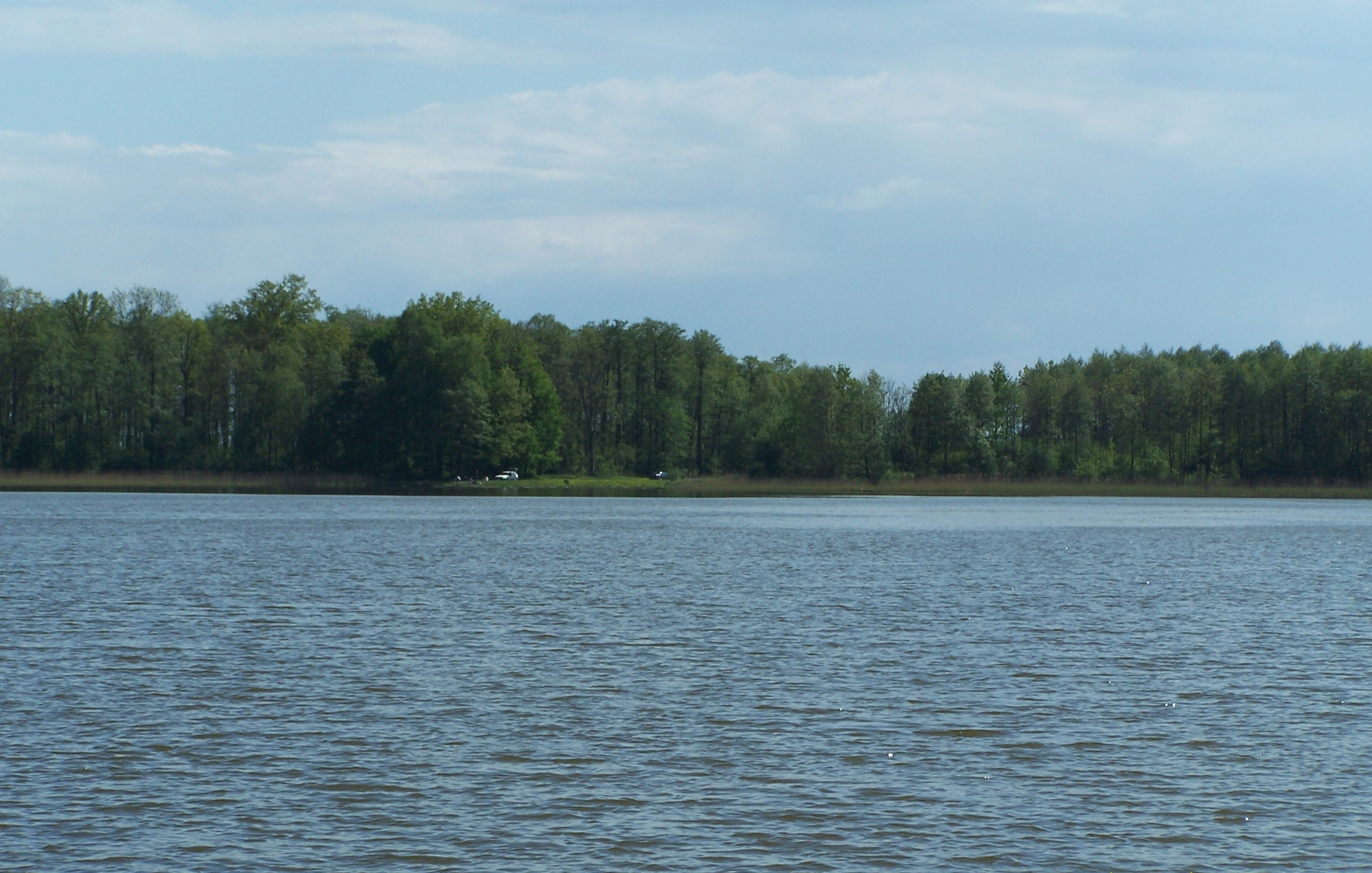 Jezioro Sztynorckie